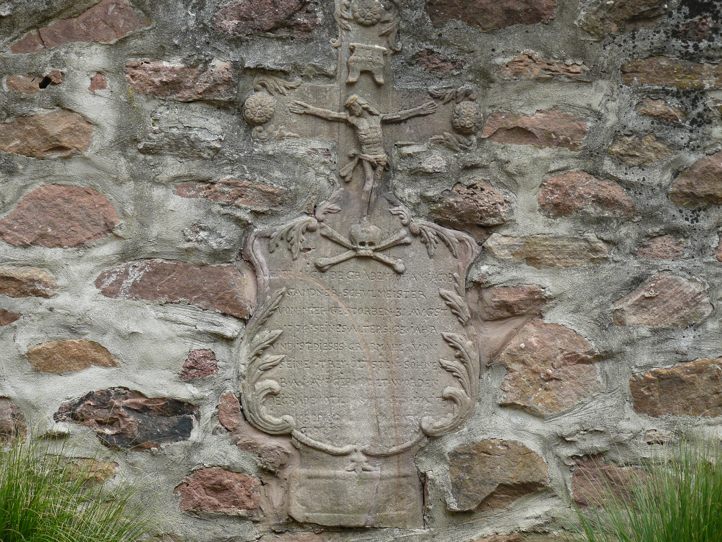 Tombe de Jacob Gandner, instituteur, décédé le 3 août 1774 à l'âge de 63 ans, encastrée dans le mur à côté de l'église.